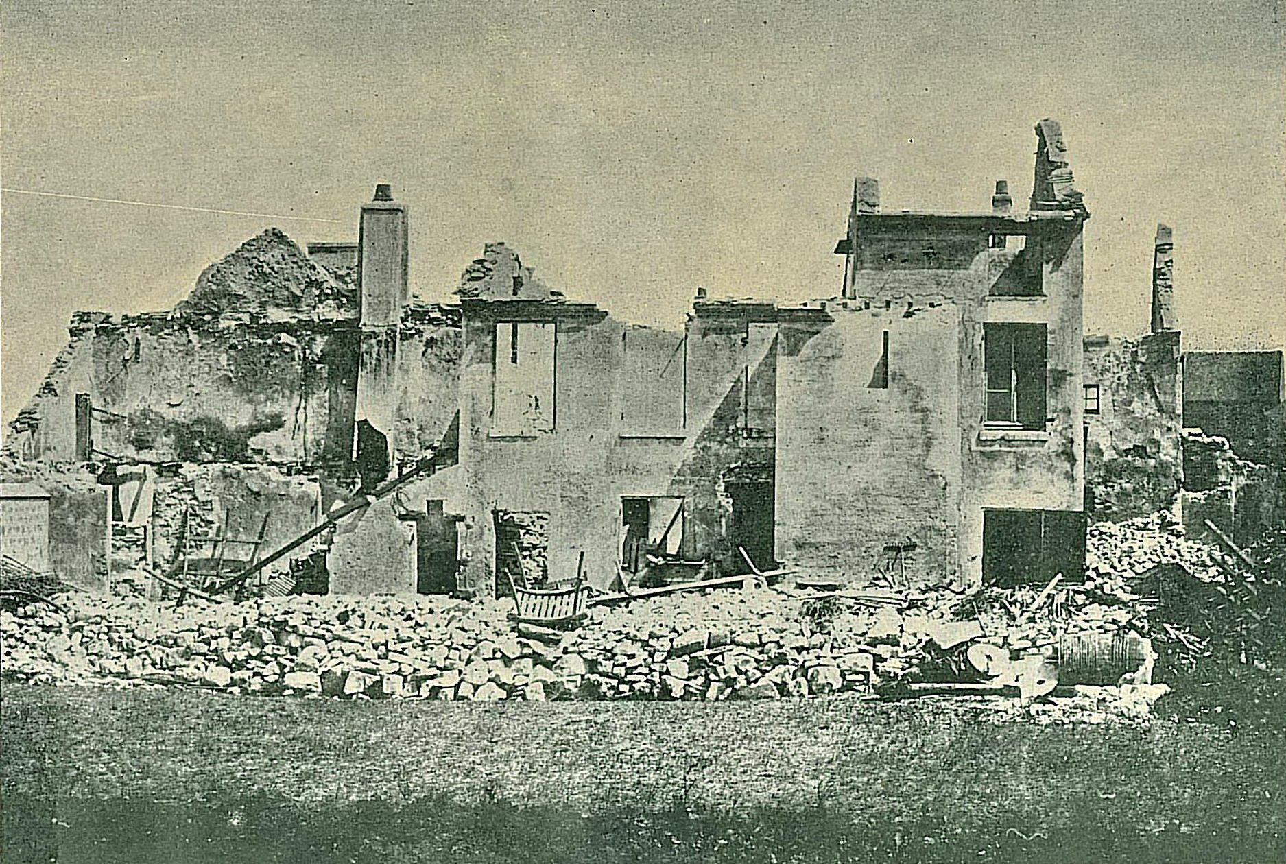 Les ruines de la Maison Lemaître à Bobigny (Seine-Saint-Denis - France), après les combats de la Guerre franco-allemande de 1870